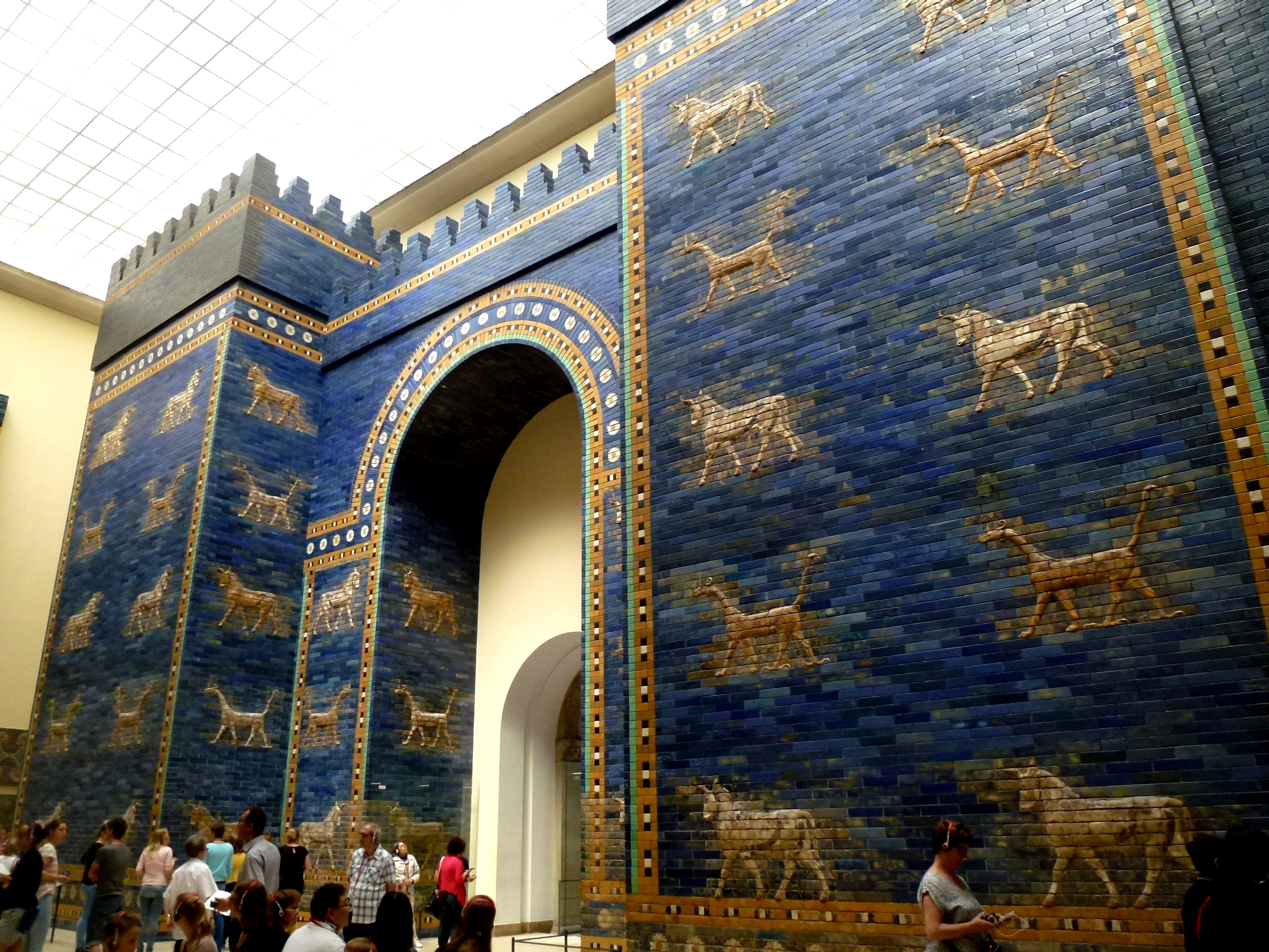 Ischtar Tor Babylonien Pergamonmuseum Berlin Germany